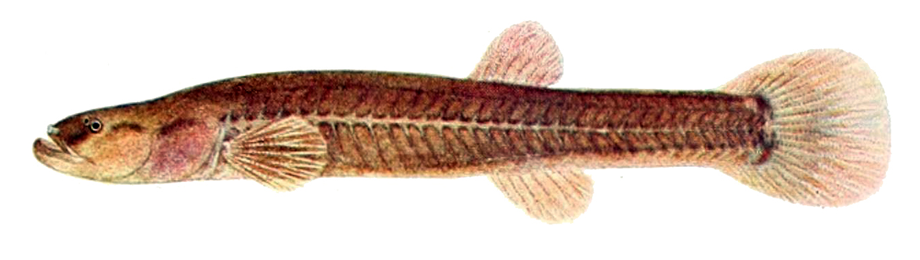 Forbesichthys agassizii